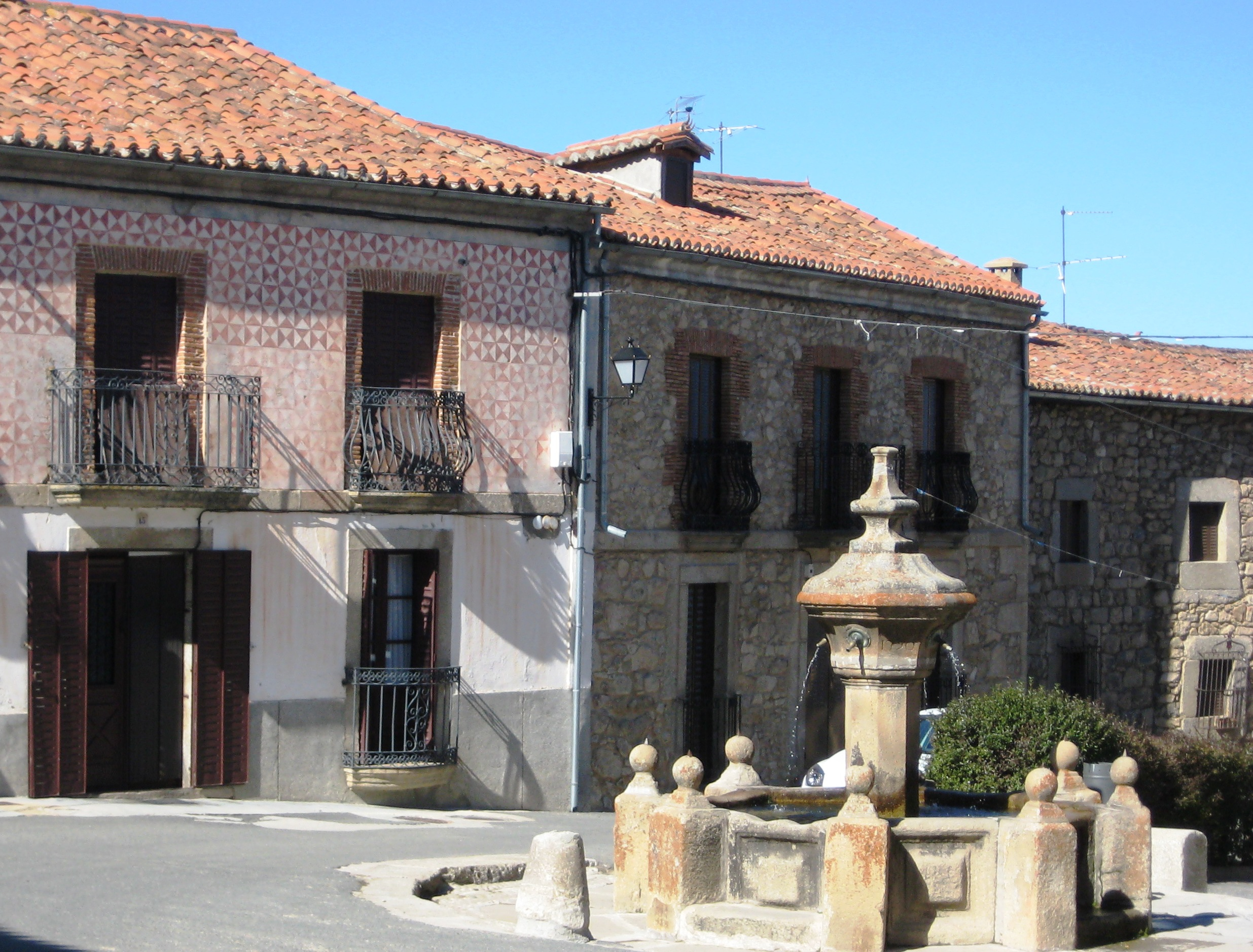 FACHADA OCCIDENTAL DE LA PLAZA MAYOR DE VILLAFRANCA DE LA SIERRA (AVILA, ESPAÑA)